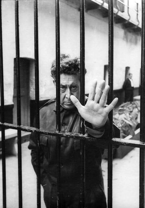 Lecumberri, México, D.F., 1960. Archivo fotográfico Héctor y María García